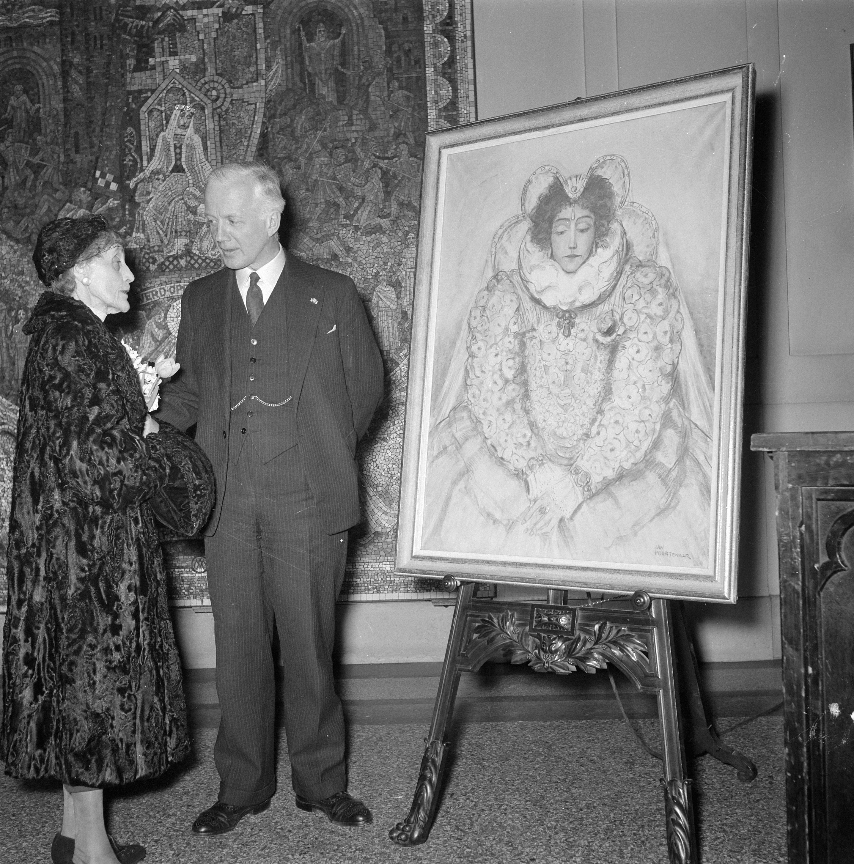 Collectie / Archief : Fotocollectie Anefo Reportage / Serie : [ onbekend ] Beschrijving : Aanbieding schilderij Else Mauhs Annotatie : Naast haar de burgemeester van Amsterdam: A.J. d'Ailly Datum : 6 februari 1954 Trefwoorden : aanbiedingen, schilderijen Persoonsnaam : Mauhs, Else Fotograaf : Noske, J.D. / Anefo, [onbekend] Auteursrechthebbende : Nationaal Archief Materiaalsoort : Negatief (zwart/wit) Nummer archiefinventaris : bekijk toegang 2.24.01.03 Bestanddeelnummer : 906-2890